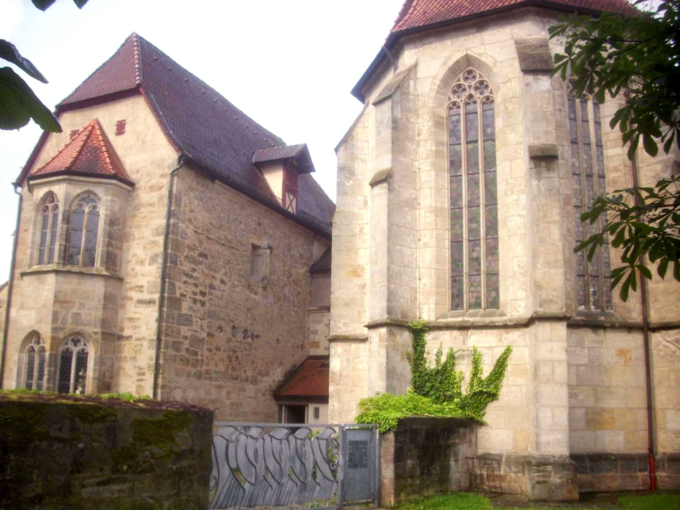 Neunkirchen am Brand-Klosterkirche über Chor sowie Nebenkirche (mit Chorapsiden) Ostnordosten über Kirchhof-29052012